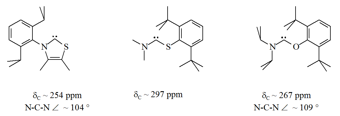 Alder carbenes